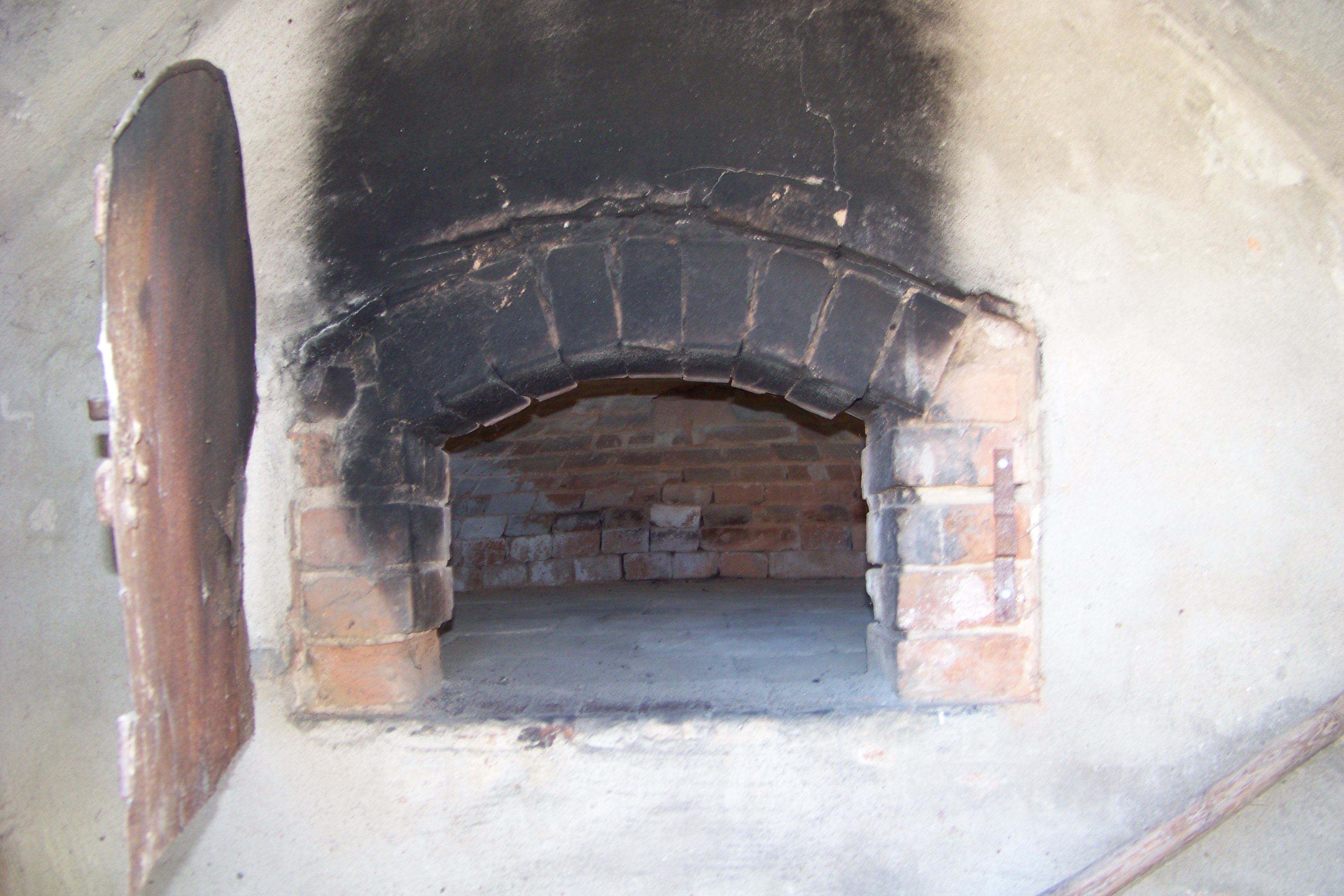 Brotbackofen in dem Backhäuschen in Neuhöflein